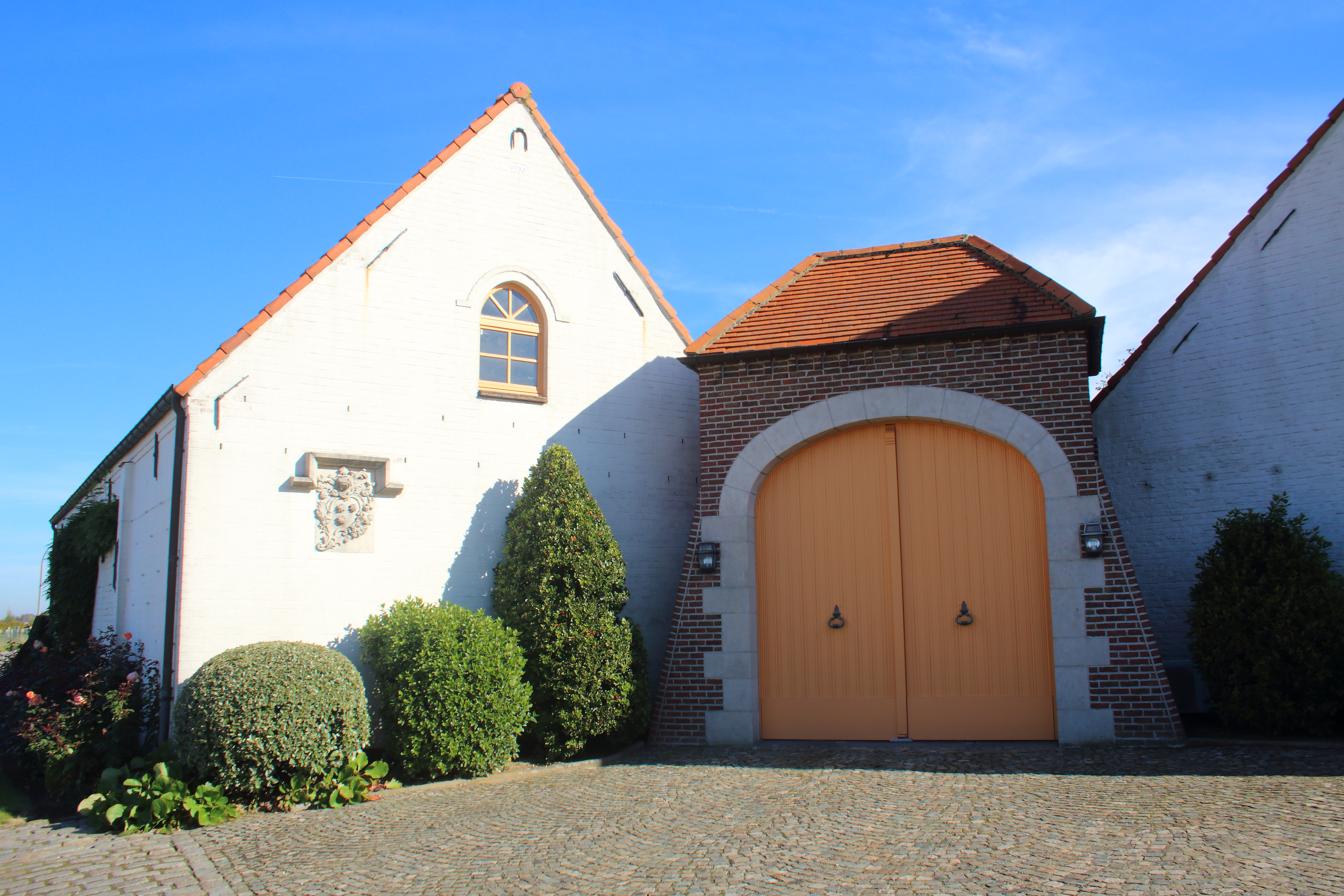 Gesloten hoeve, Steenbekestraat, Velzeke-Ruddershove, Zottegem, Vlaanderen, België